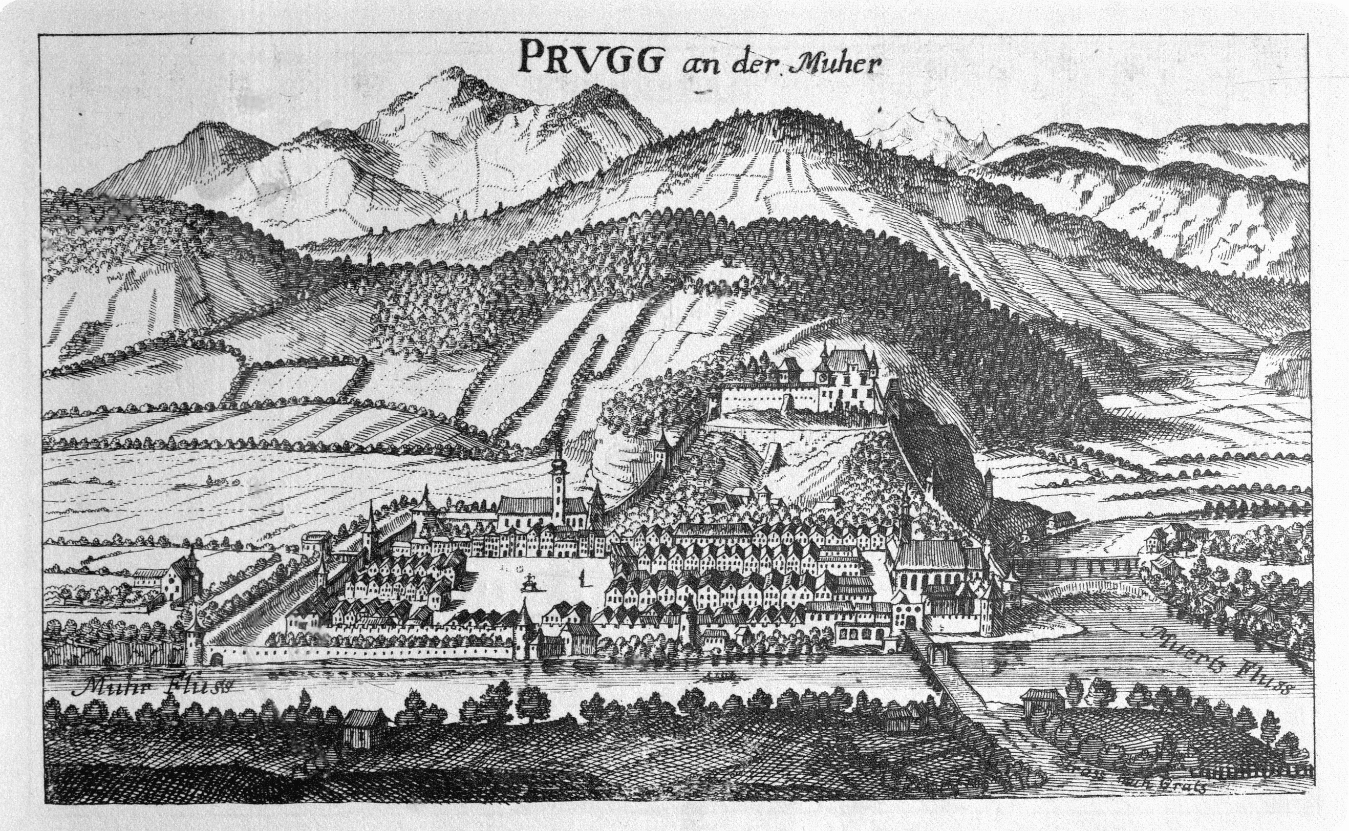 G. M. Vischers Käyserlichen Geographi, Topographia Ducatus Stiriae, Das ist: Eigentliche Delineation / und Abbildung aller Städte / Schlösser / Marcktfleck / Lustgärten / Probsteyen / Stiffter / Clöster und Kirchen / so es sich im Herzogthumb Steyrmarck befinden; Und anjetzo Umb einen billichen Preyß zu finden seynd Bey Johann Bitsch Universitäts Buchhandlern / Auff dem Juden=Platz bey der guldenen Saulen. Graz 1681 Die Nummerierung der Dateien folgt der alphabetischen Reihung der Orte